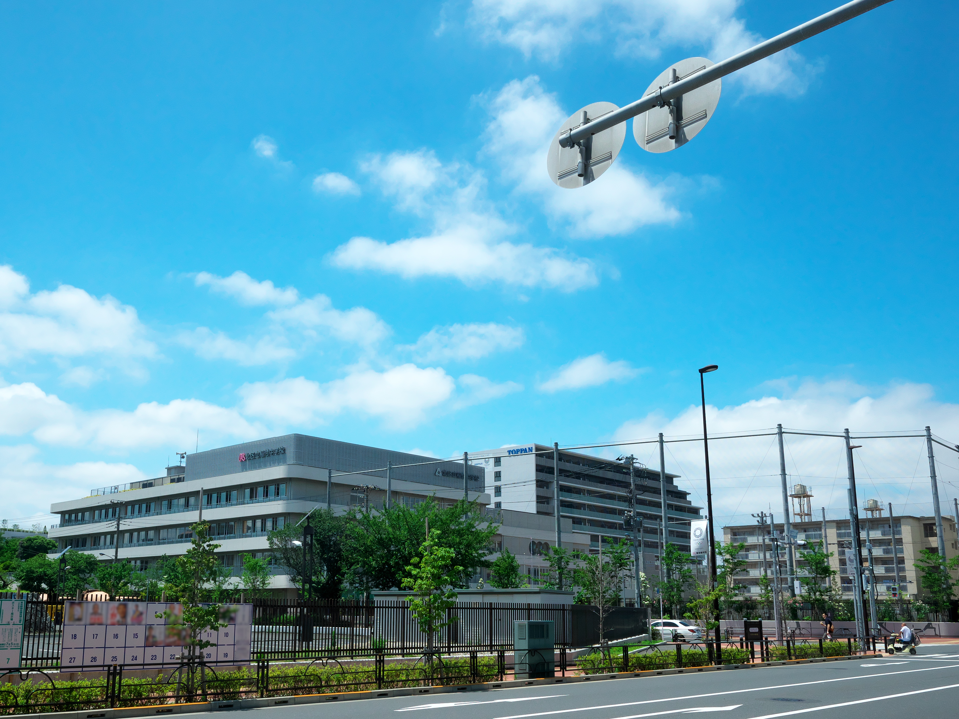 稲付中学校の遠景の写真です。